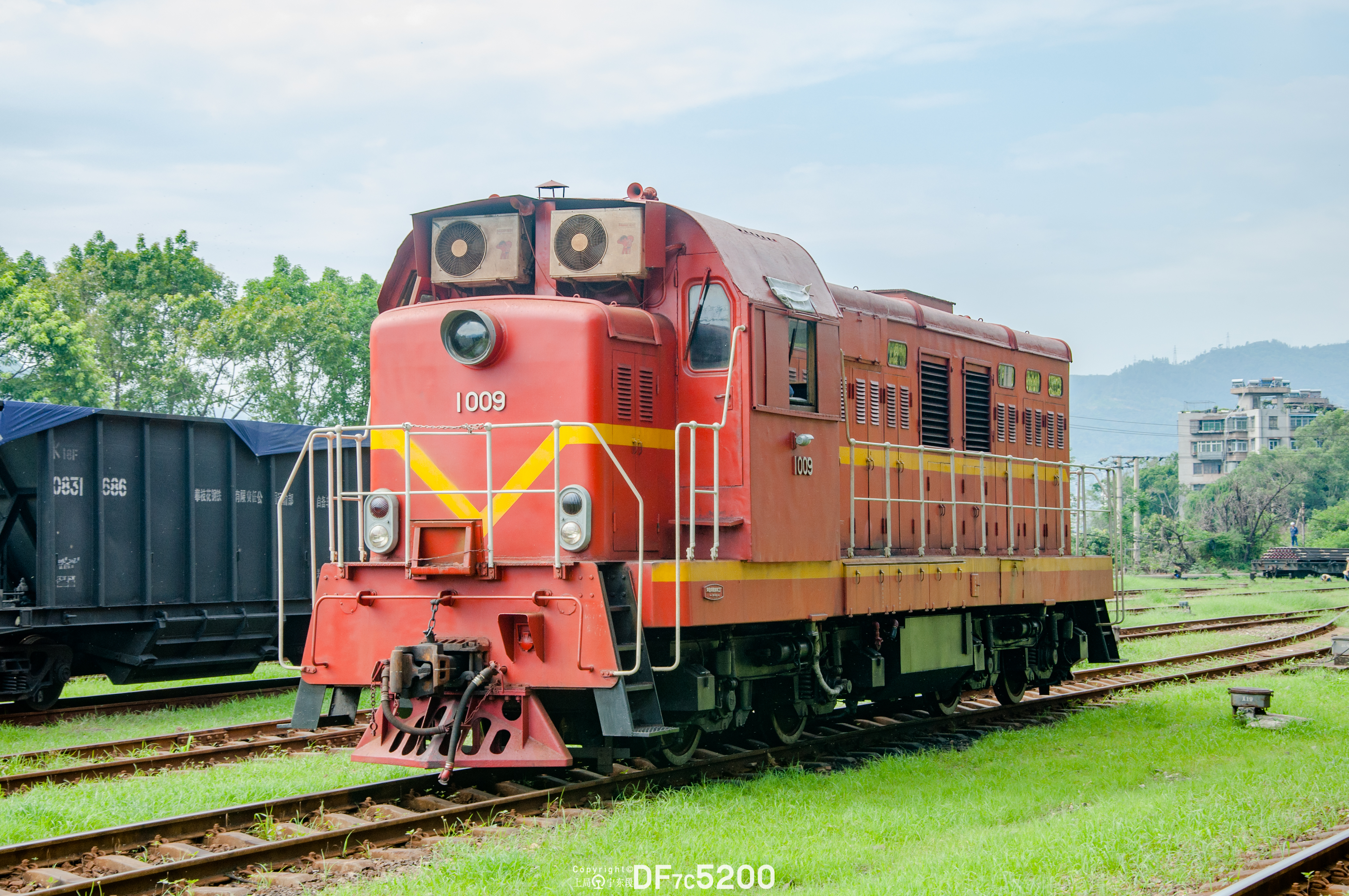 中文（中国大陆）: 攀钢公司购买的中国铁路东方红7B型液力传动内燃机车